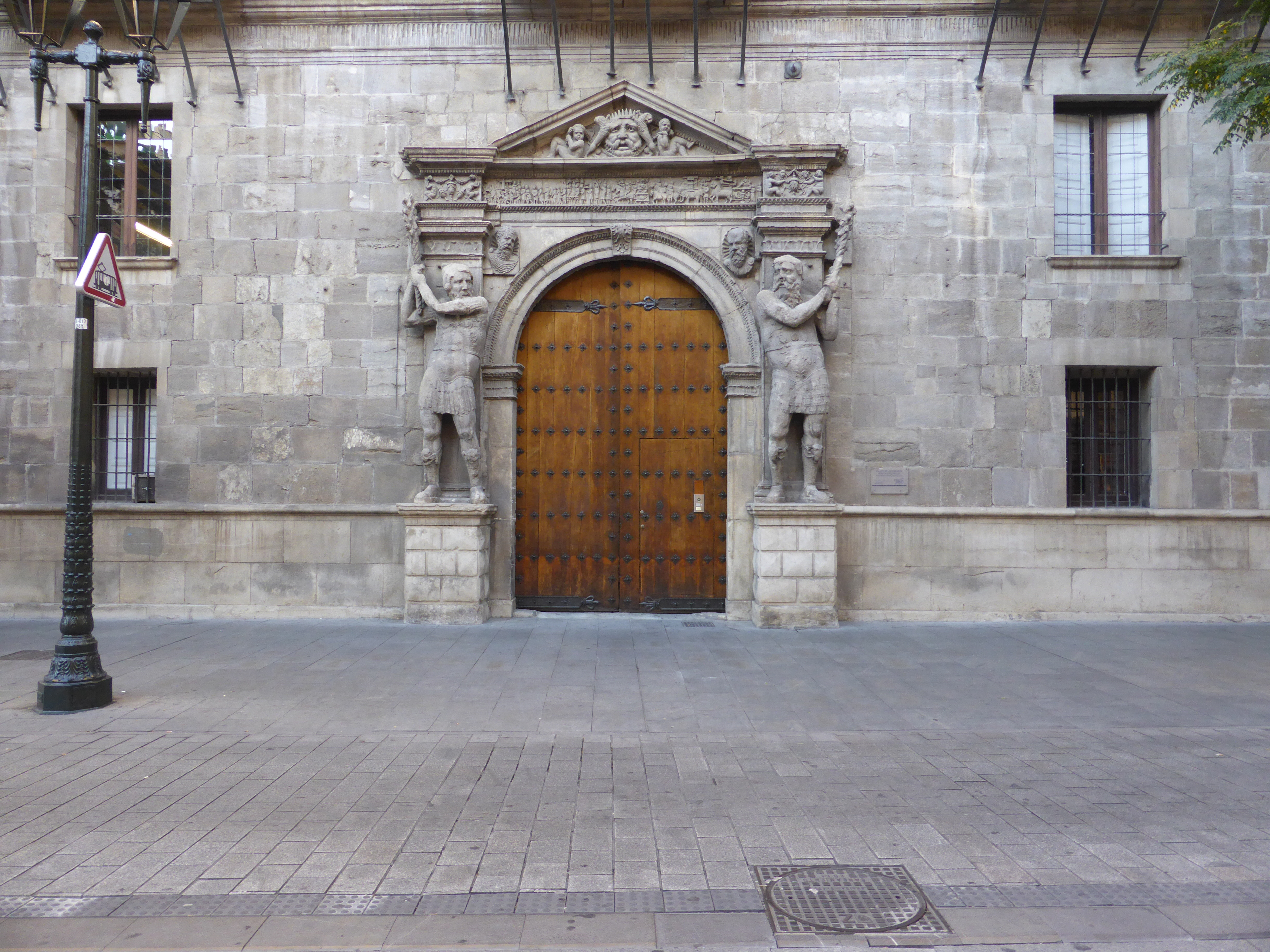 Palacio renacentista del siglo XVI. Sede de la Audiencia de Aragón, actualmente Tribunal Superior de Justicia de Aragón. Calle Coso, número 1.